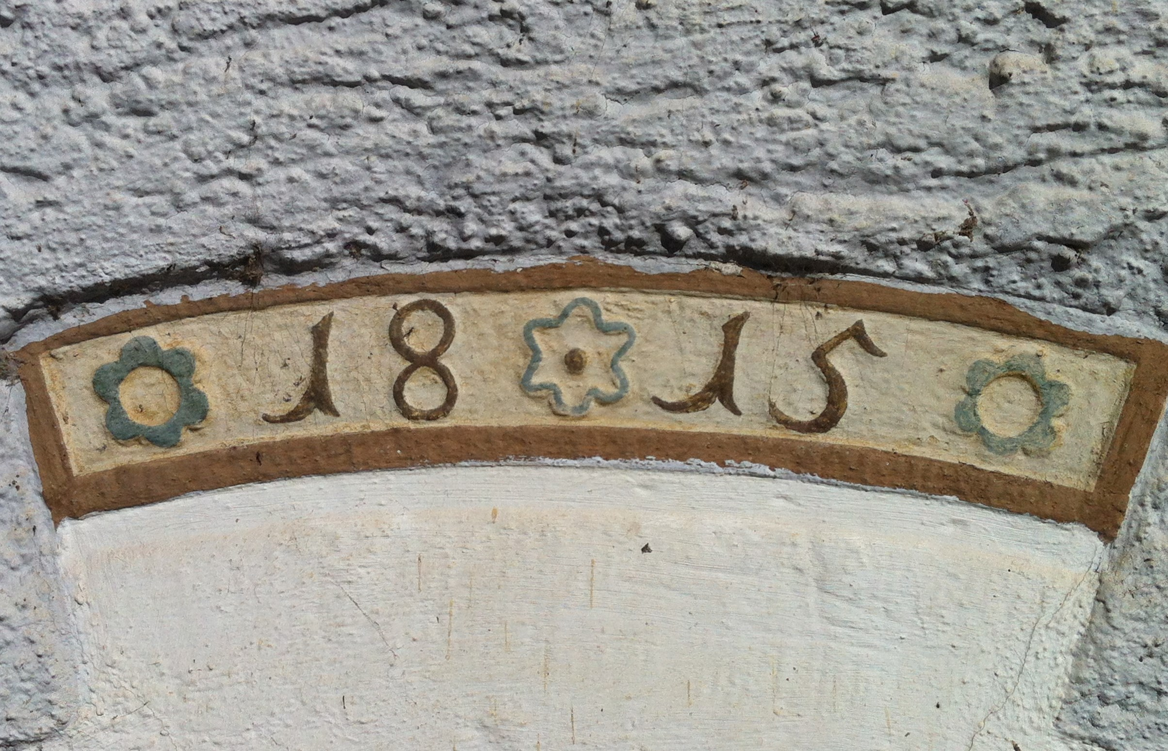 Gasthaus Der Engel in Rheinheim, Ortsteil der Gemeinde Küssaberg im Landkreis Waldshut in Baden-Württemberg. Jahreszahl 1815 am äußeren rechten Eingang der Straßenseite.